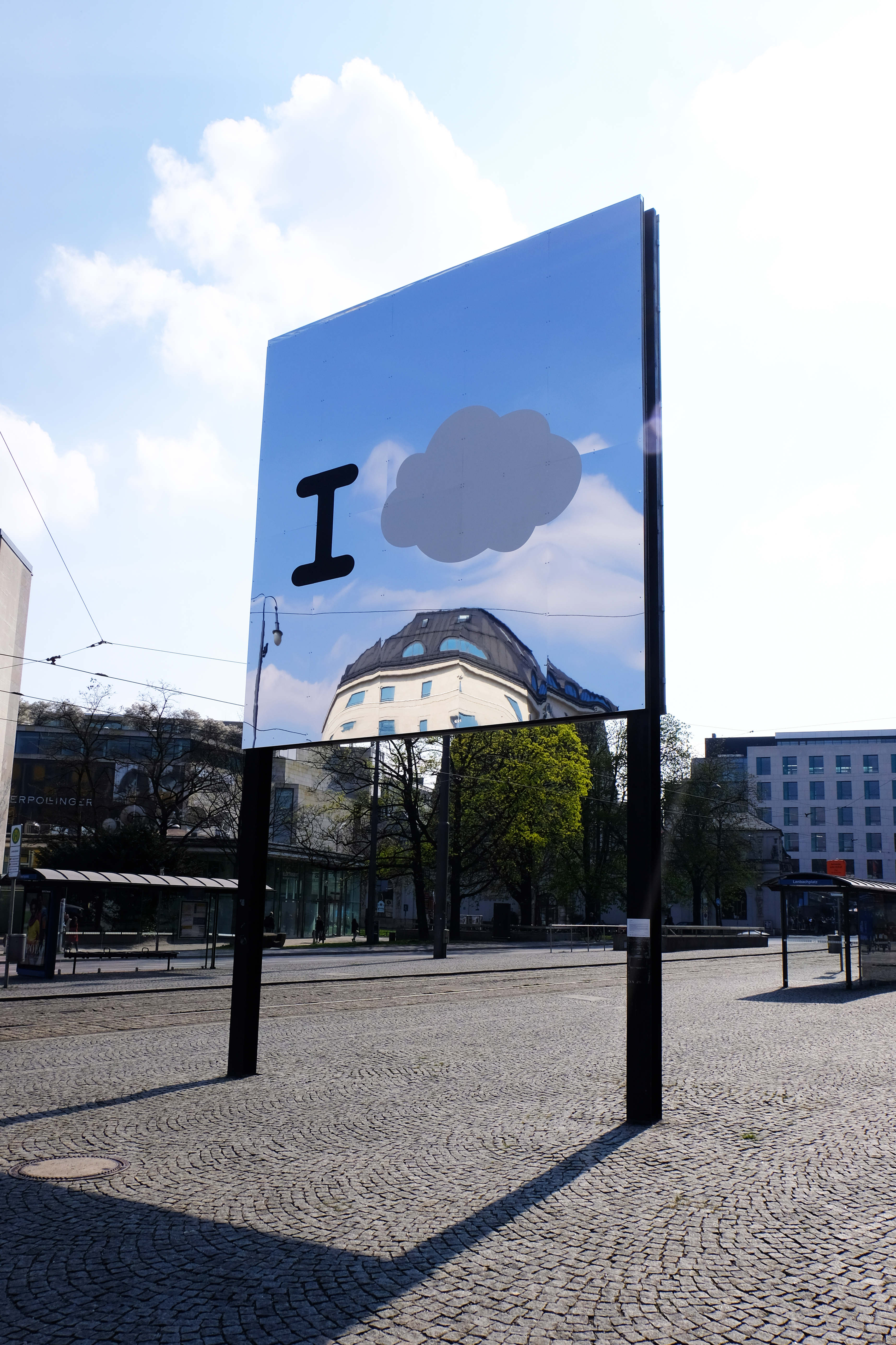 „BLAU“ by Ayzit Bostan, Munich, Lenbachplatz, 2019